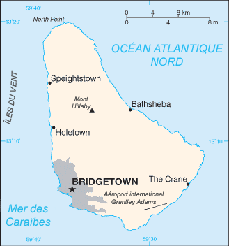 Carte de La Barbade Source : CIA World Factbook (traduite) Historique de l'image originale (suppr) (actu) 18 septembre 2005 à 13:57 . . Sting (Discuter) . . 329x352 (13303 octets) (Océan) (suppr) (rétab) 23 juin 2005 à 09:47 . . Pixeltoo (Discuter) . . 329x352 (7360 octets) (Carte de la Barbade {DP} )